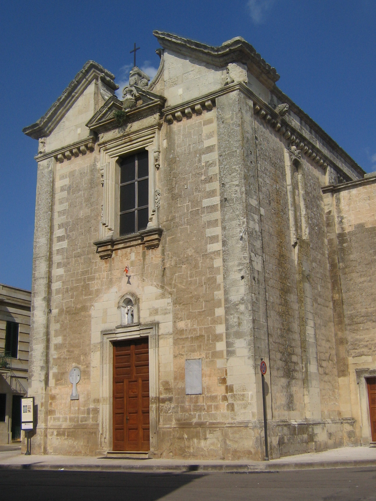 Chiesa Madre di Cannole. Provincia di Lecce.